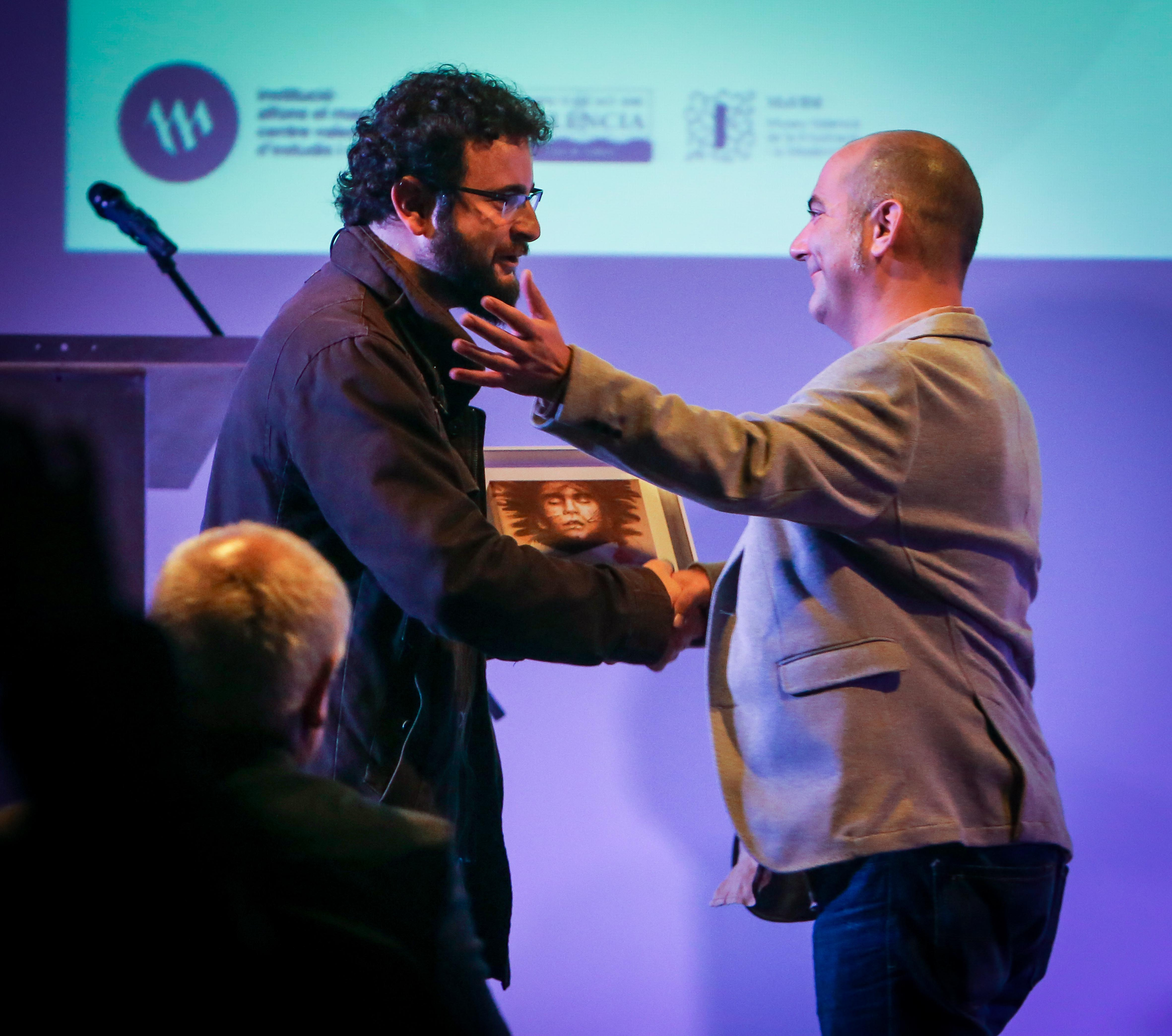 Gala dels premis València 2016